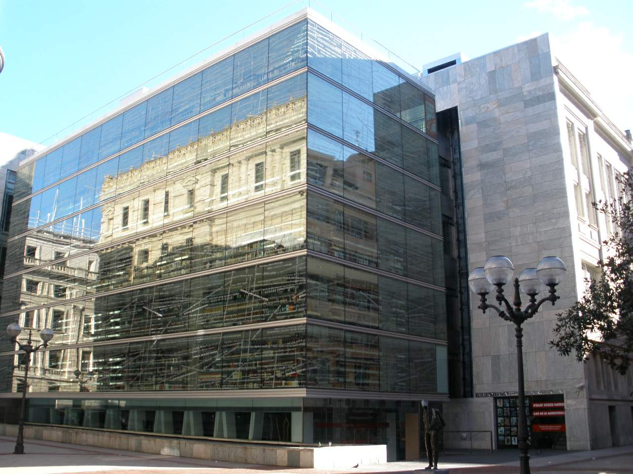 Biblioteca Foral de Bizkaia (Bilbao)